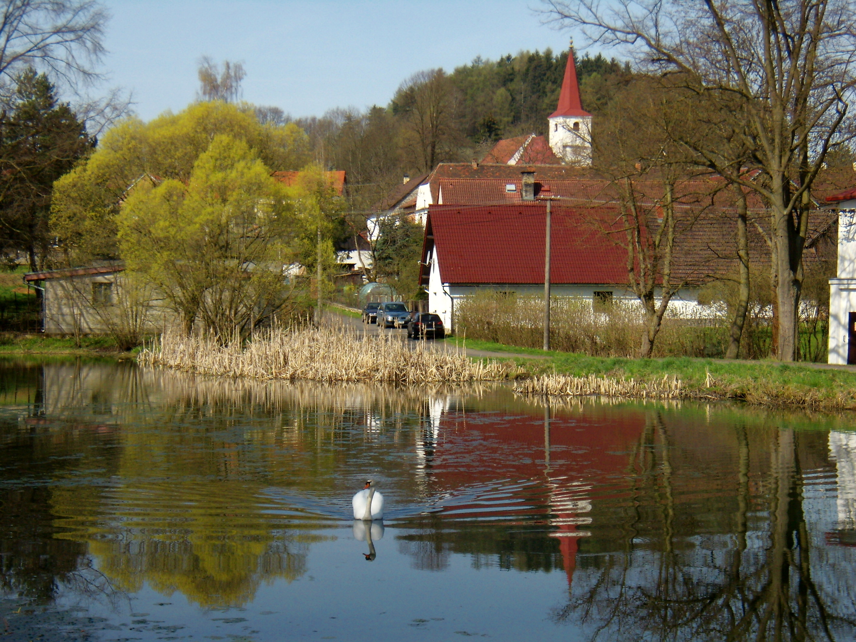 Kydliny